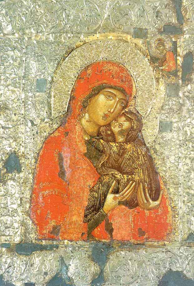 Saint Anne with child Mary (Св. Анна с младенцем Марией)